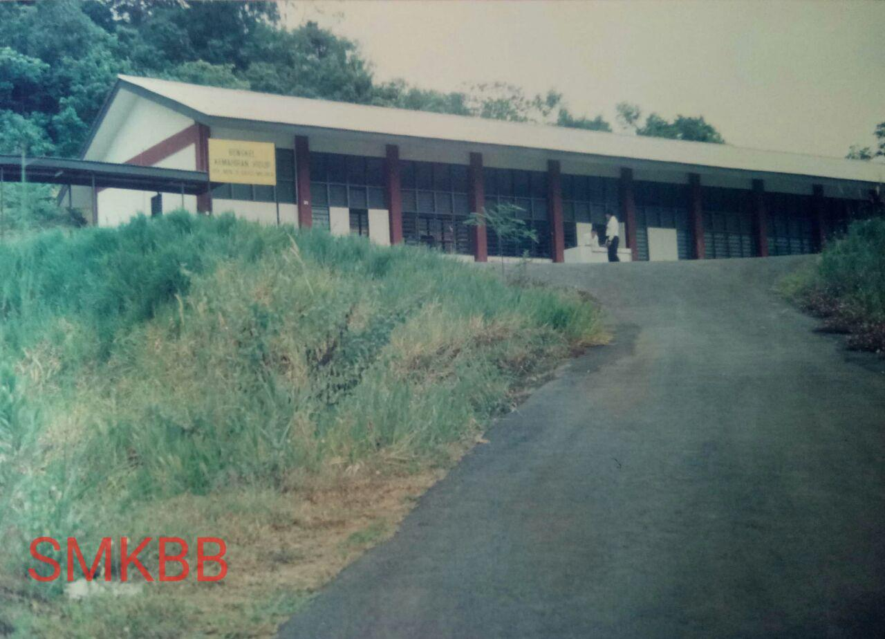 Bengkel Kemahiran hidup